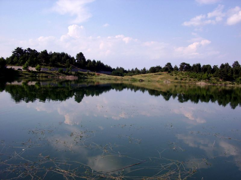 Руенско езеро